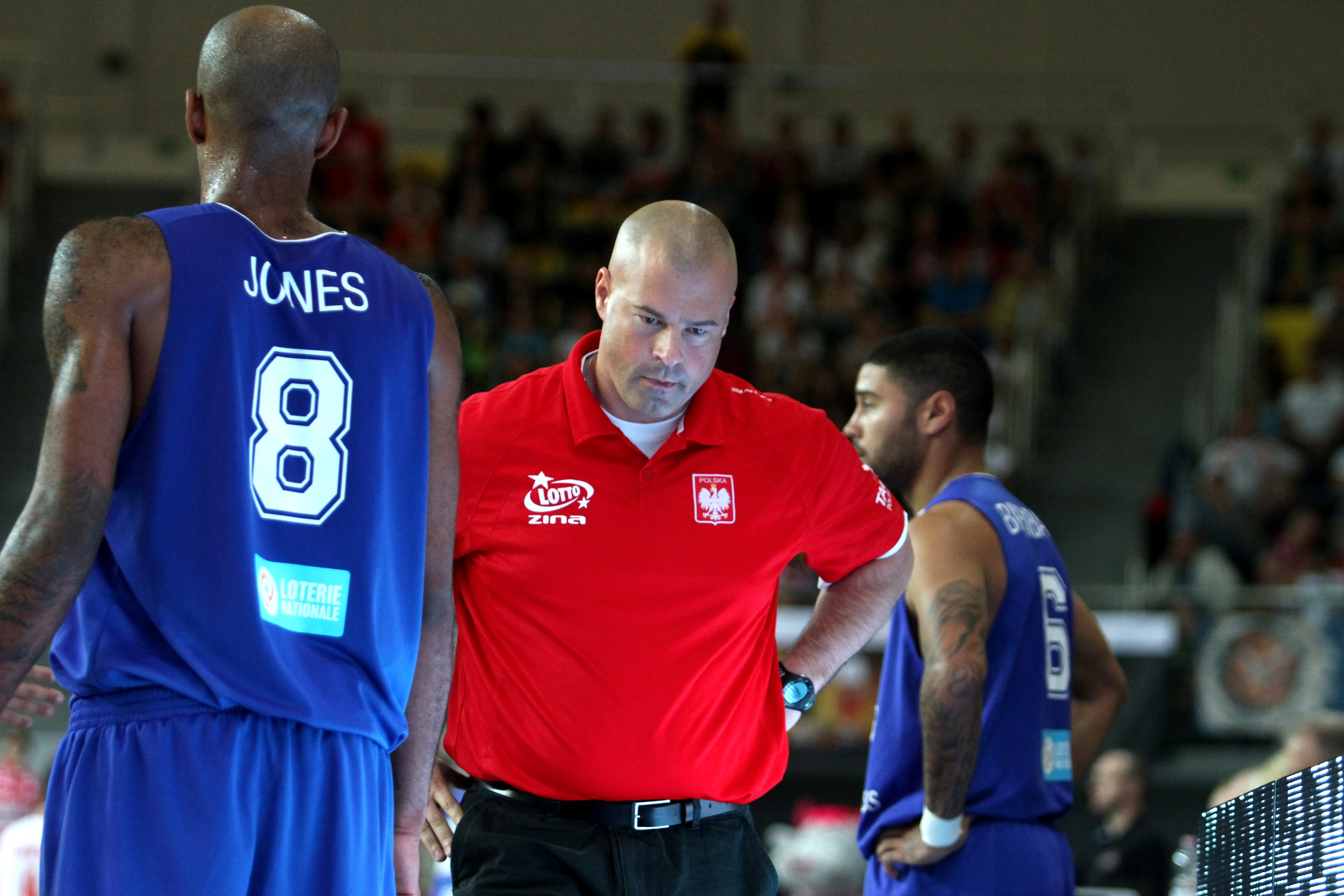 Eliminacje do EuroBasketu 2015: Polska – Luksemburg, Koszalin, 27 sierpnia 2014. Trener Mike Taylor